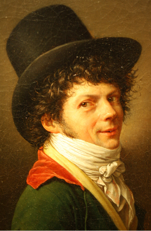 Self-portrait